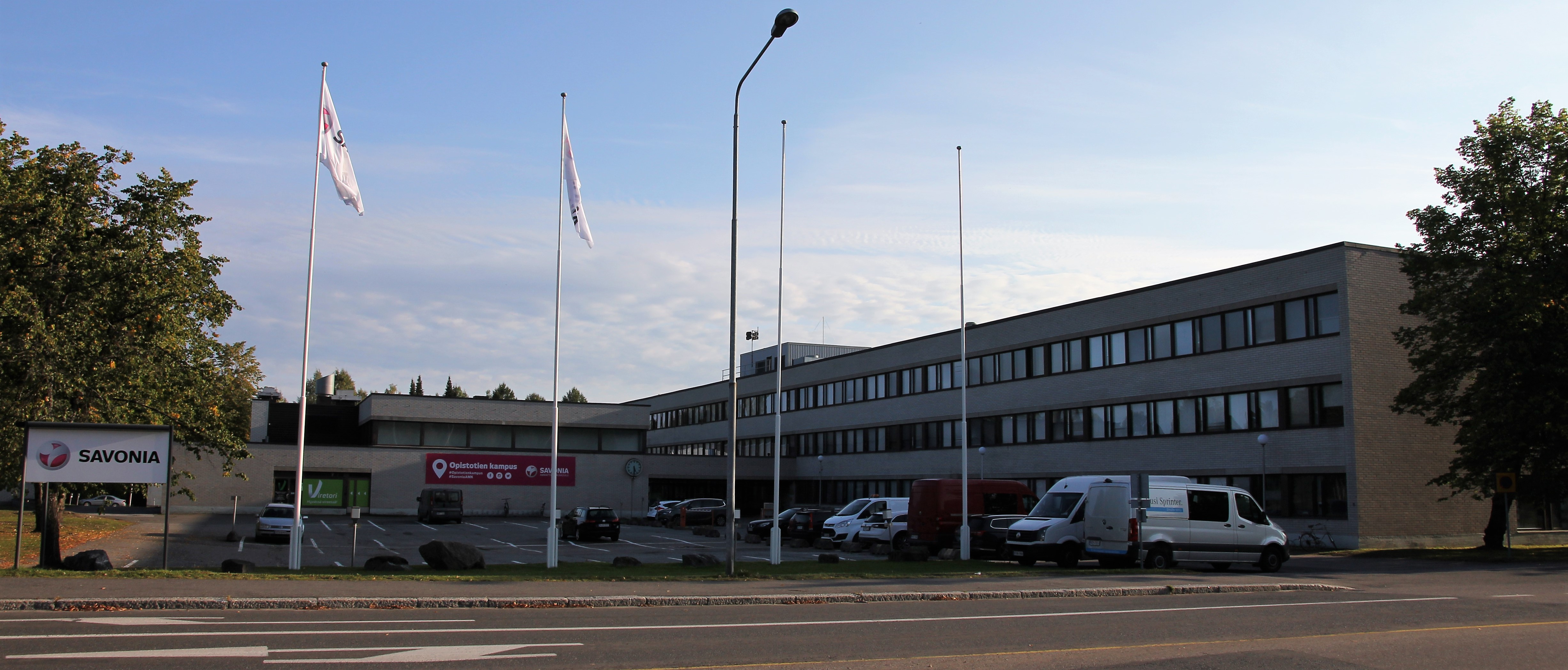 Savonia-ammattikorkeakoulun tekniikan opetuksen tiloja osoitteessa Opistotie 2, Kuopion keskustaan kuuluvassa Hatsalan kaupunginosassa.